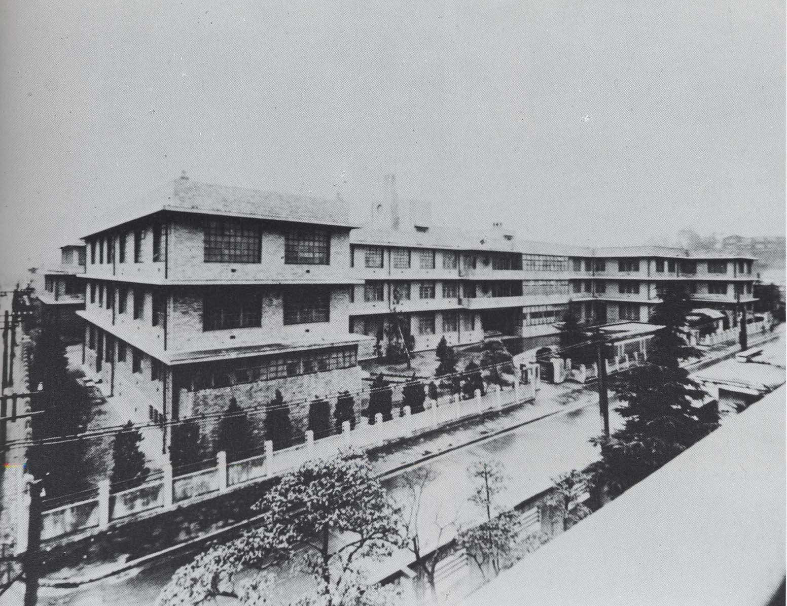 東京慈恵会医科病院校舎